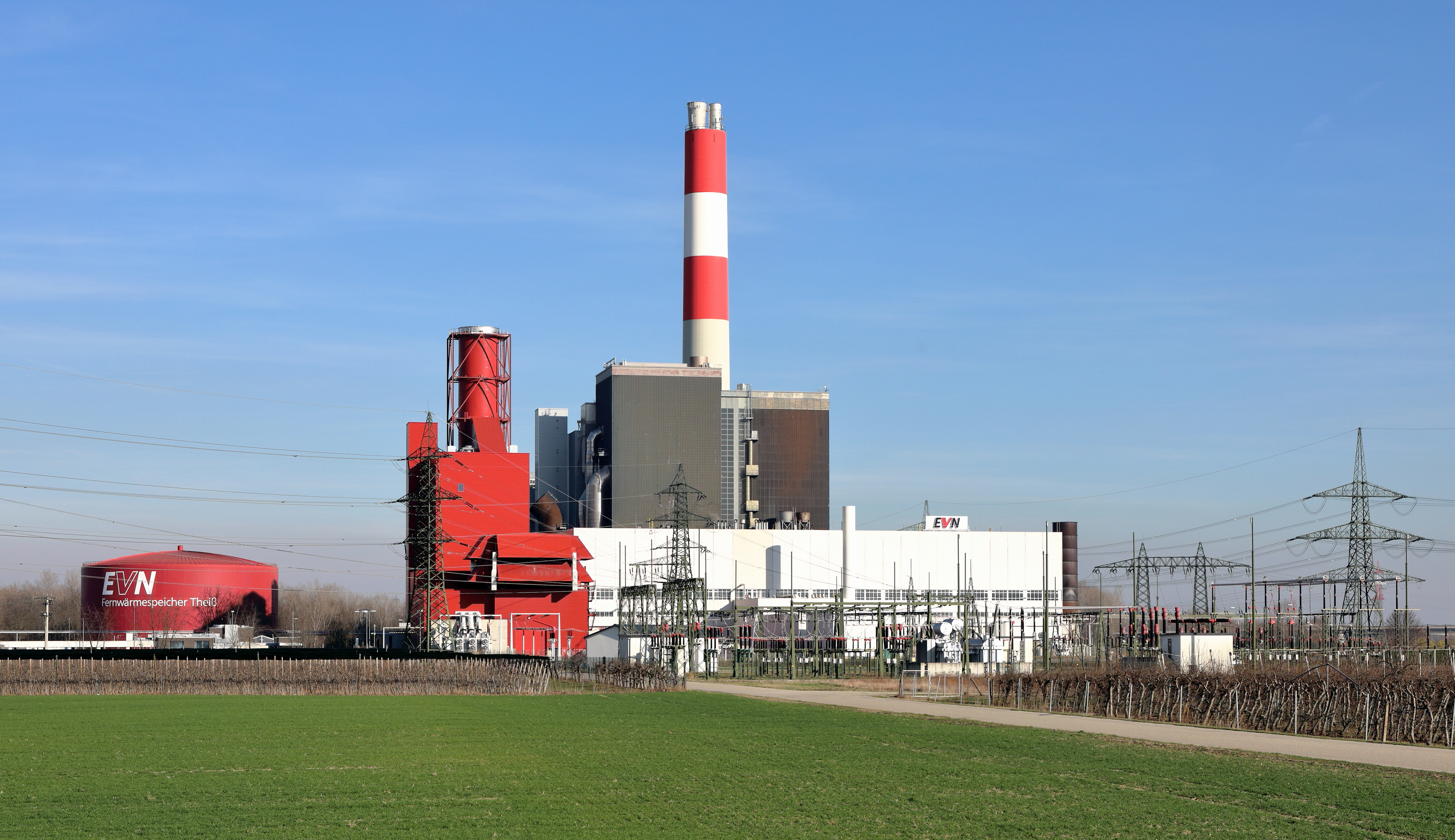 Nordwestansicht des Wärmekraftwerkes in Theiß, ein Ortsteil der niederösterreichischen Gemeinde Gedersdorf, und links der 50.000 m³-Fernwärmespeicher.Das Kraftwerk mit Schwarzstarteignung und einer Nennleistung von rund 800 Megawatt sowie einem 135m hohen Schornstein ist das größte, das der Energieversorger Niederösterreich (EVN AG) betreibt. Der Fernwärmespeicher links im Bild ist 30 Meter hoch, hat einen Durchmesser von 50 Metern und war ursprünglich ein Öltank. Bei der Inbetriebnahme am 11. Jänner 2008 war er der größte Fernwärmespeicher Europas.